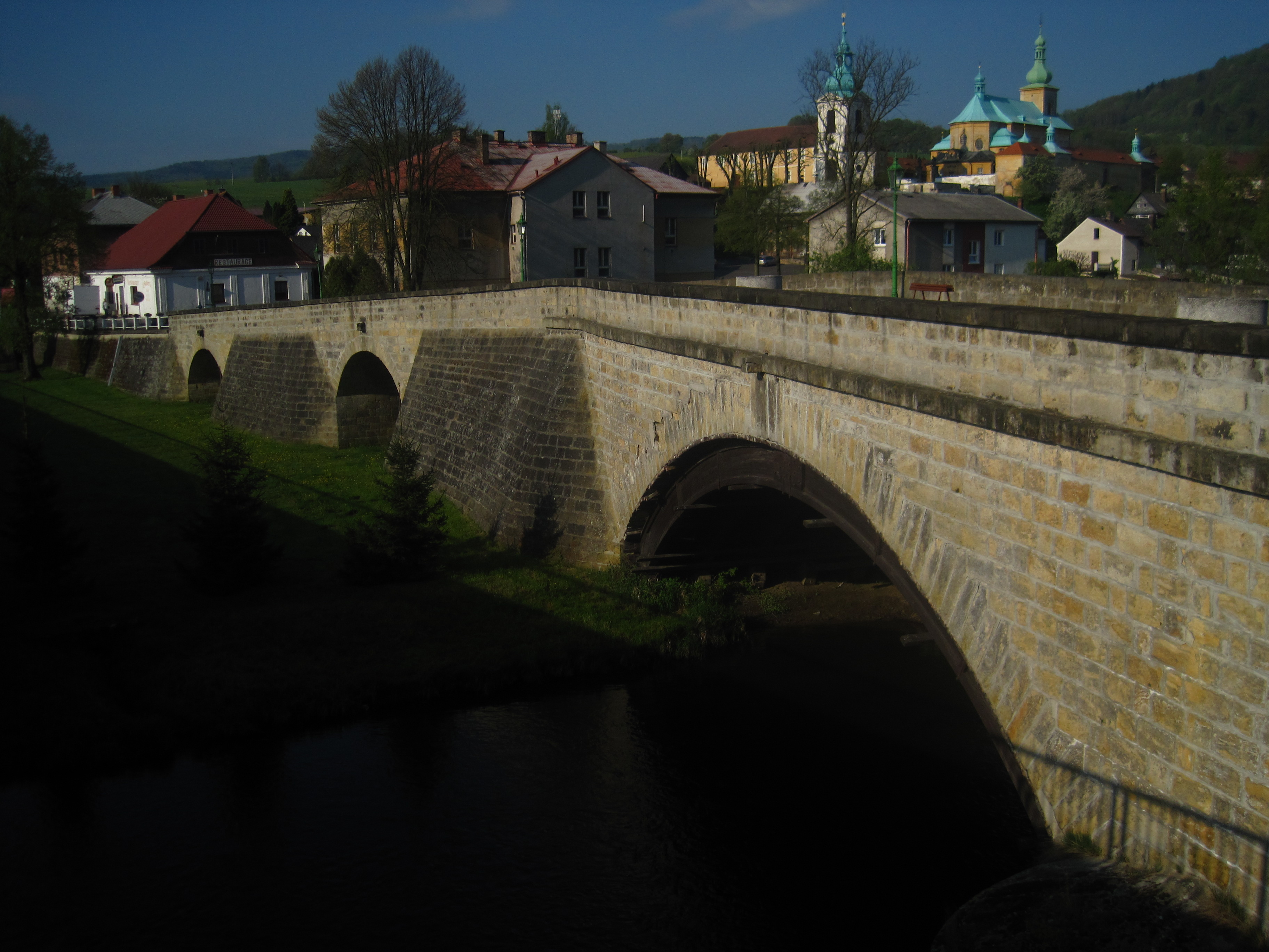 Silniční most, Horní Police.